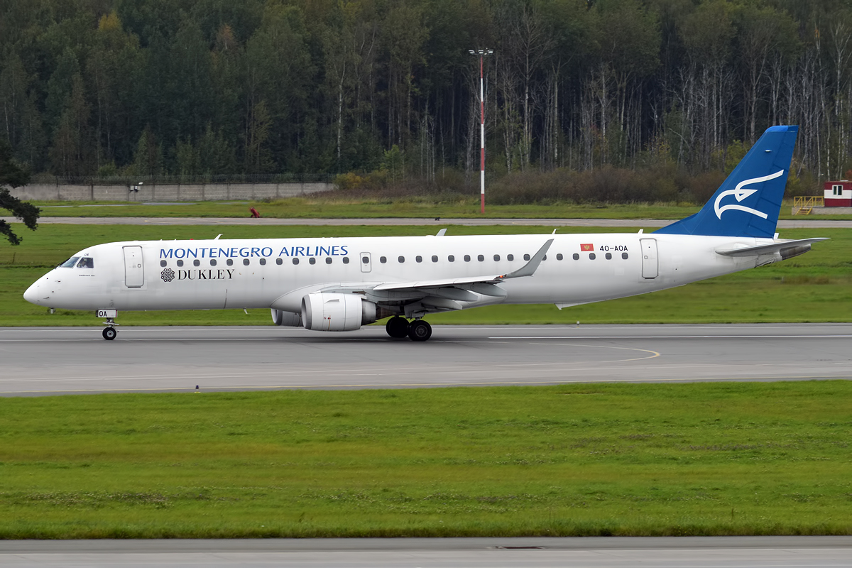 Montenegro Airlines, 4O-AOA, Embraer ERJ-195LR